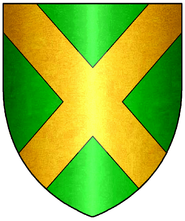 Blason de la Maison de Laguiche et le la commune de La Guiche (France)